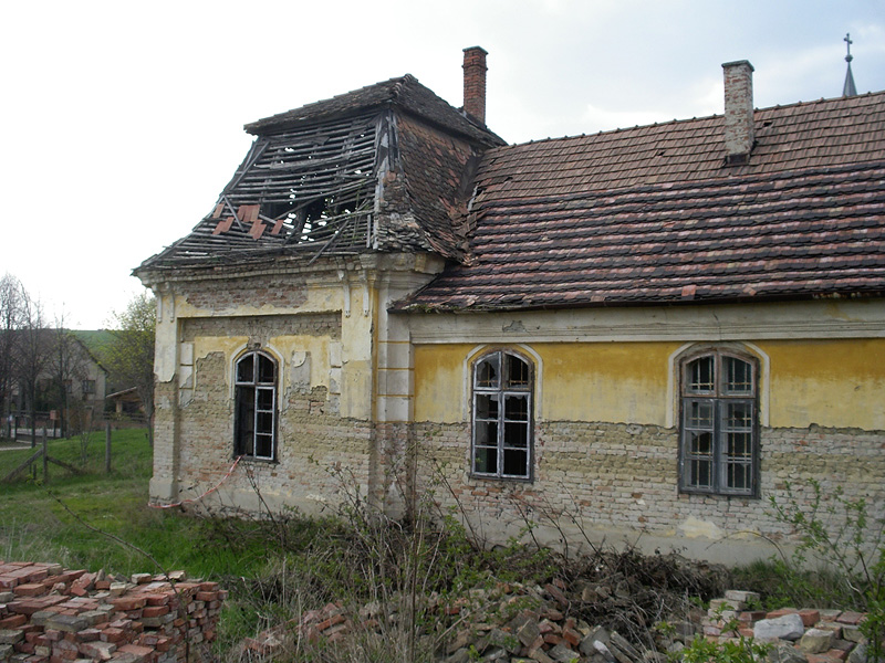 A rádi Muslay-kastély egy részlete 2007 márciusában